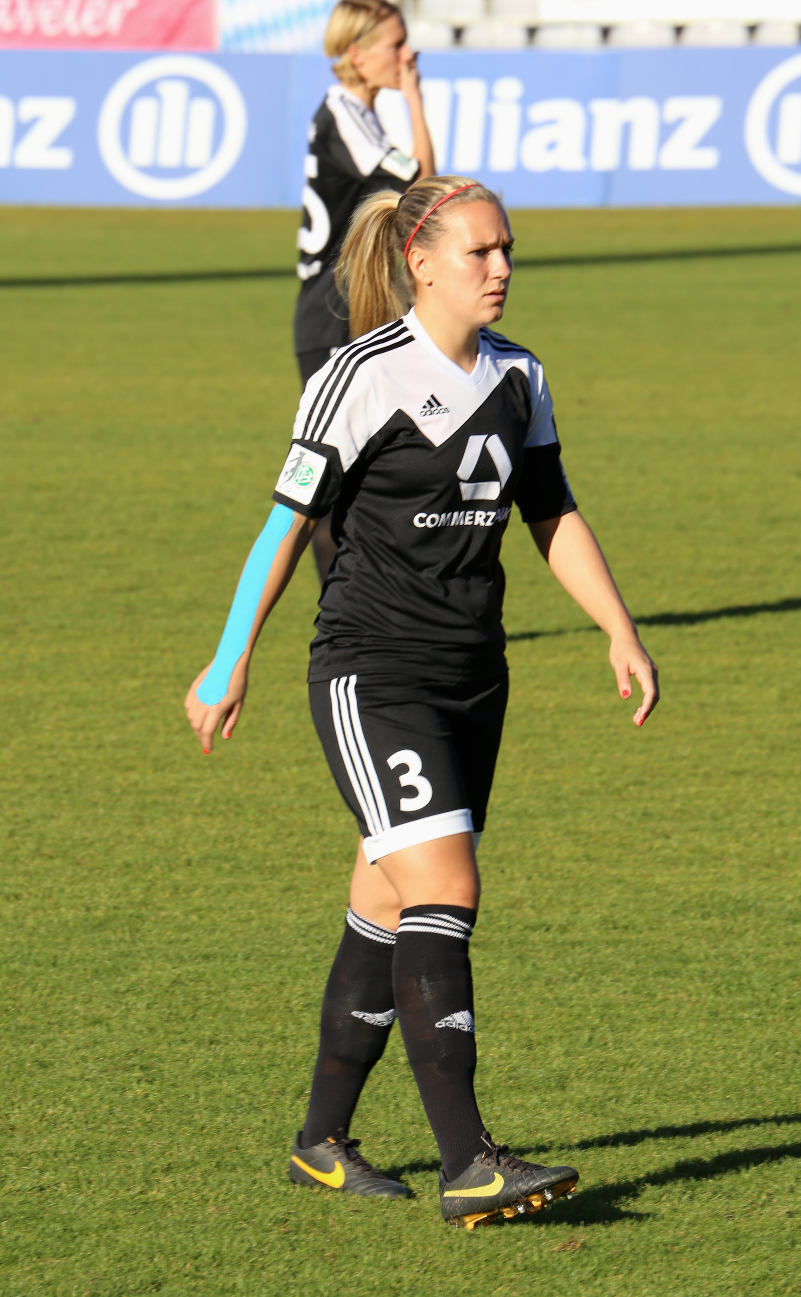 Laura Störzel (1. FFC Frankfurt) im DFB-Pokal-Achtelfinale zwischen FC Bayern München und 1. FFC Frankfurt, Ergebnis 2:0, Stadion an der Grünwalder Straße